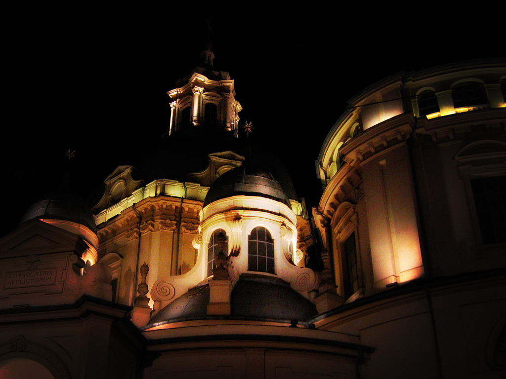 Santuario della Consolata a Torino.